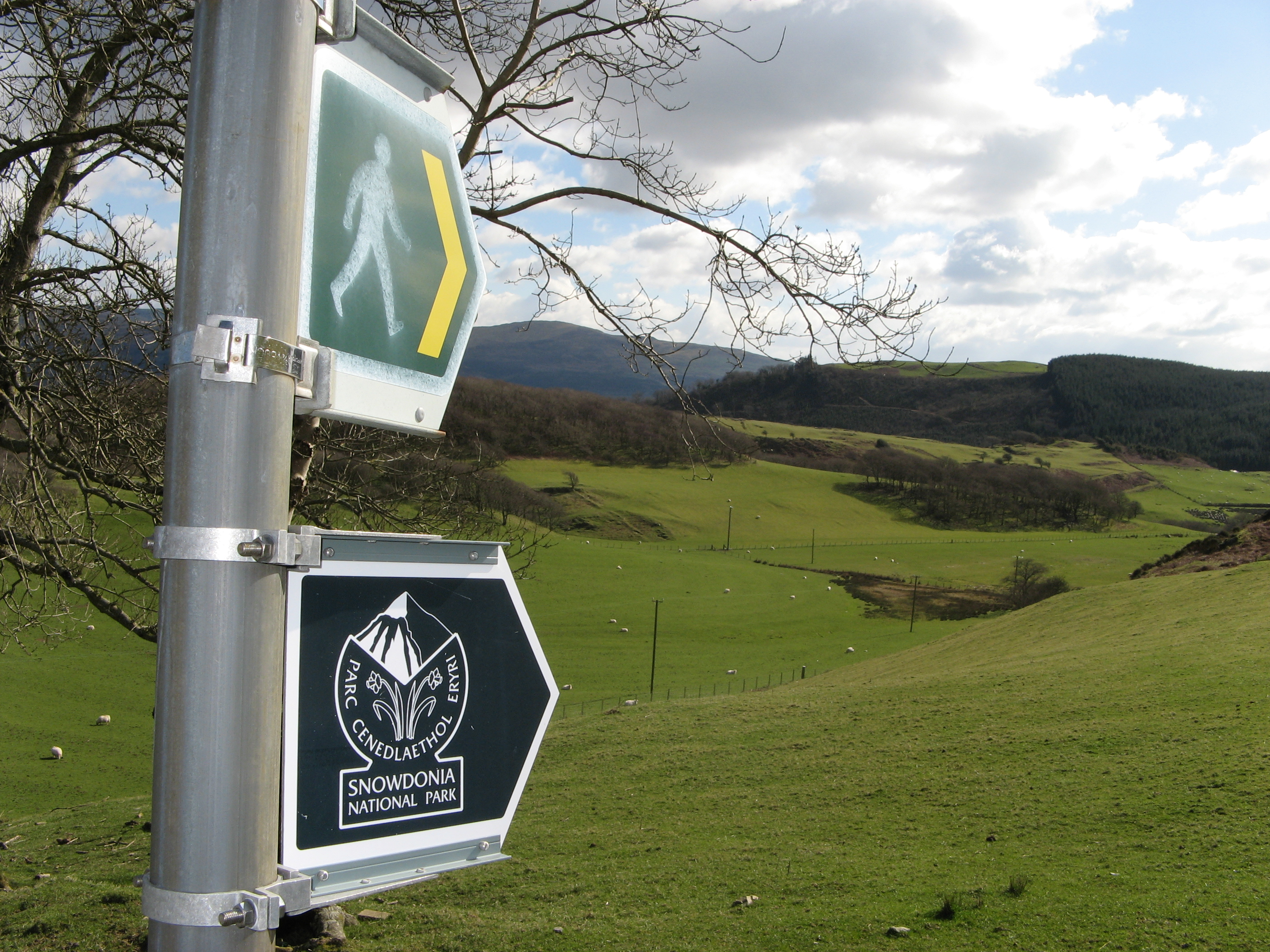 Snowdonia walks